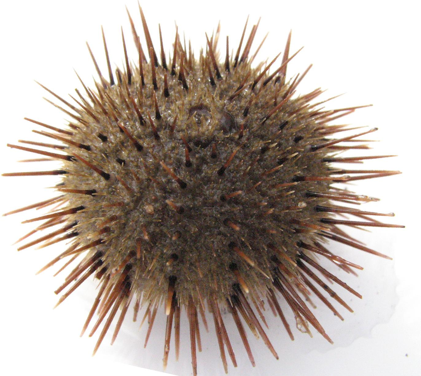 ツガルウニ(Glyptocidaris crenularis)